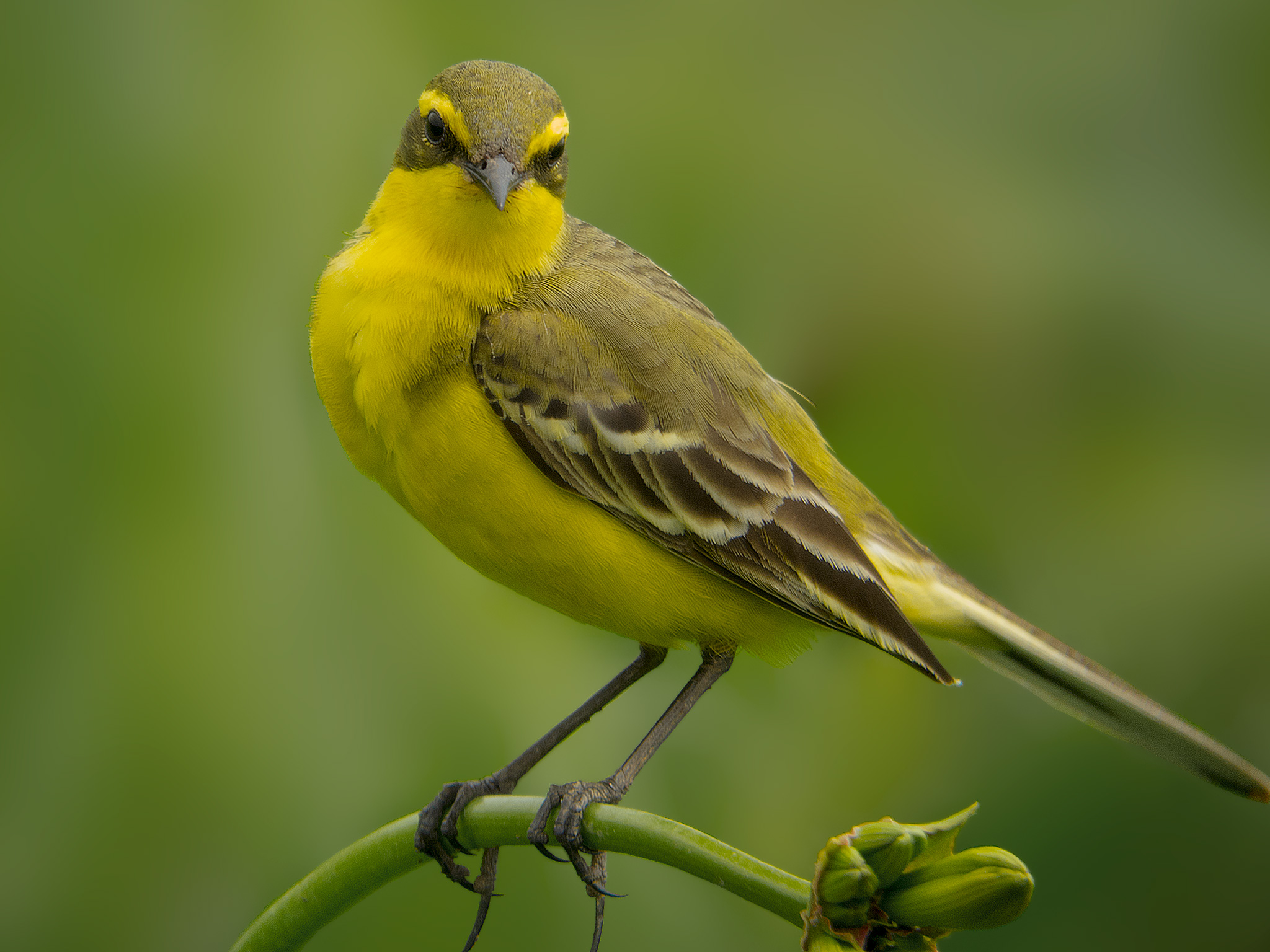 撮影地 北海道サロベツ原生花園